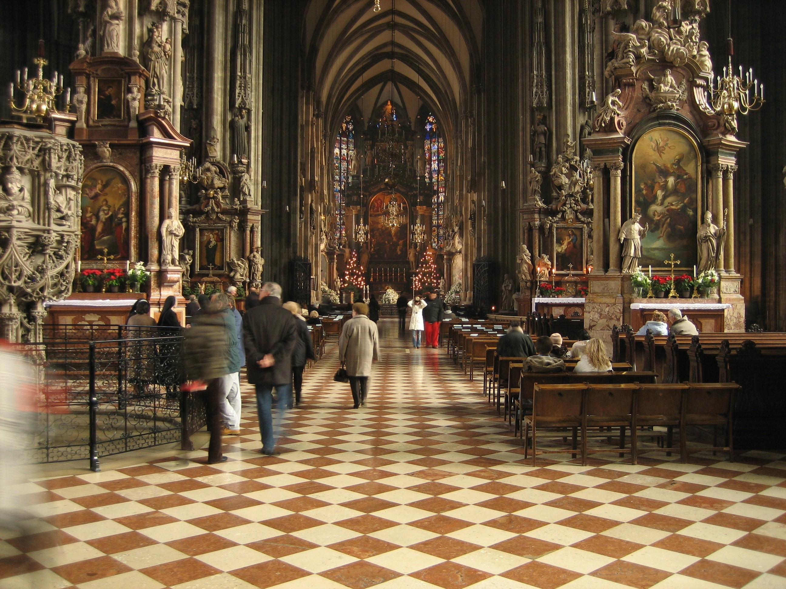 Wien_Stephansdom_Mittelschiff_01_2006